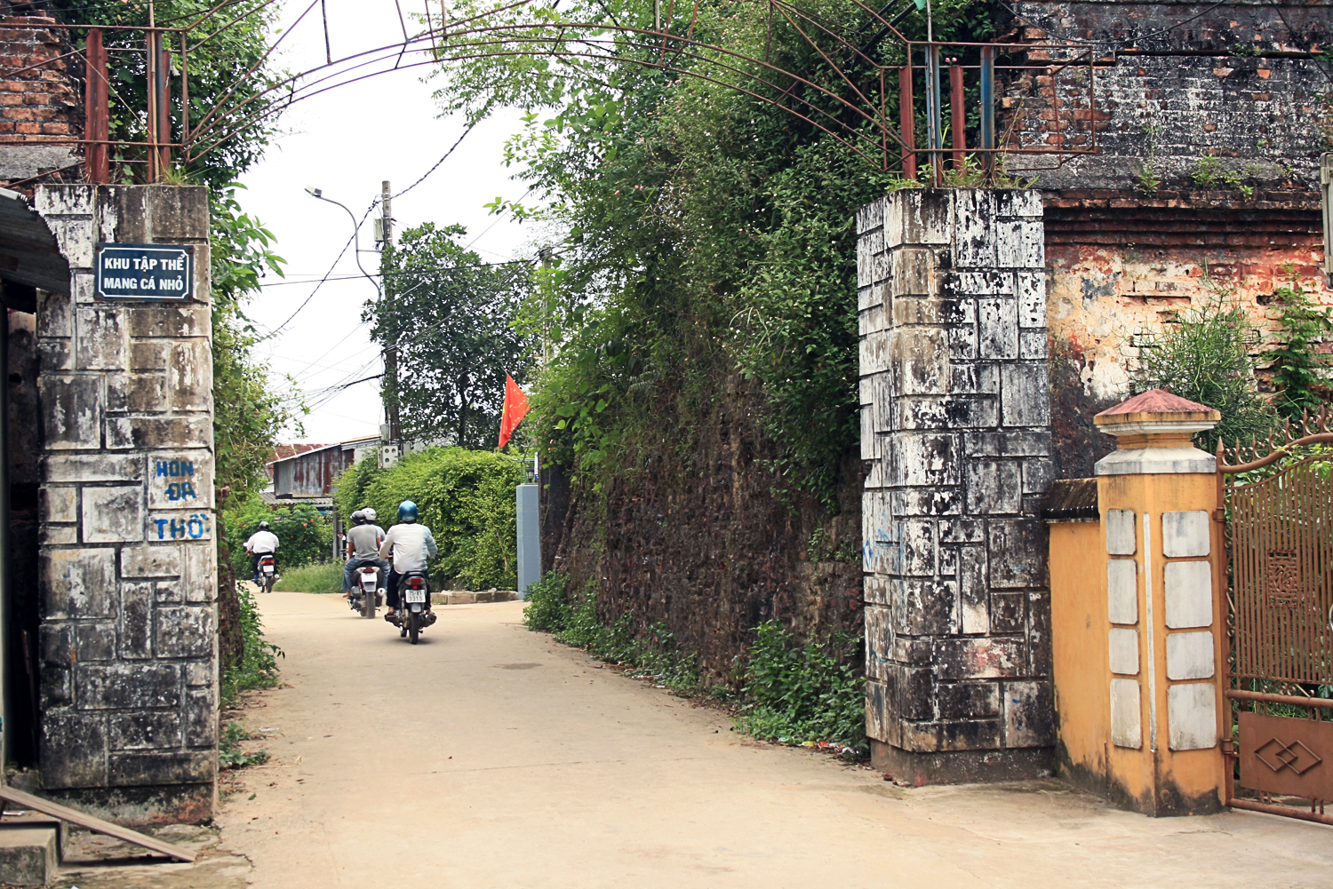 Trường Định Môn, trước đây là một cửa vào Trấn Bình đài.